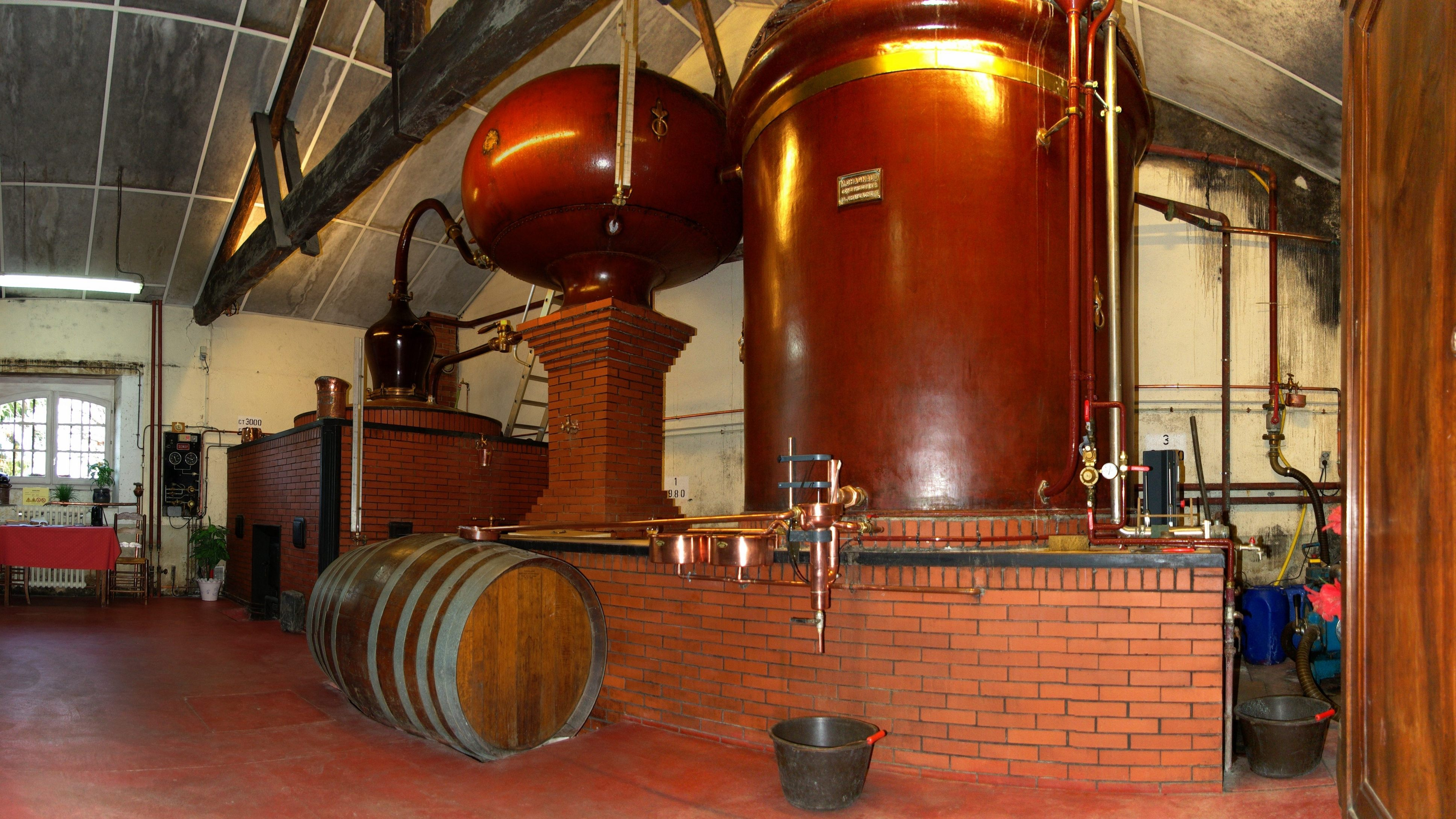 Alambic en fonctionnement, au Maine-Giraud, Champagne-Vigny, Charente, France.